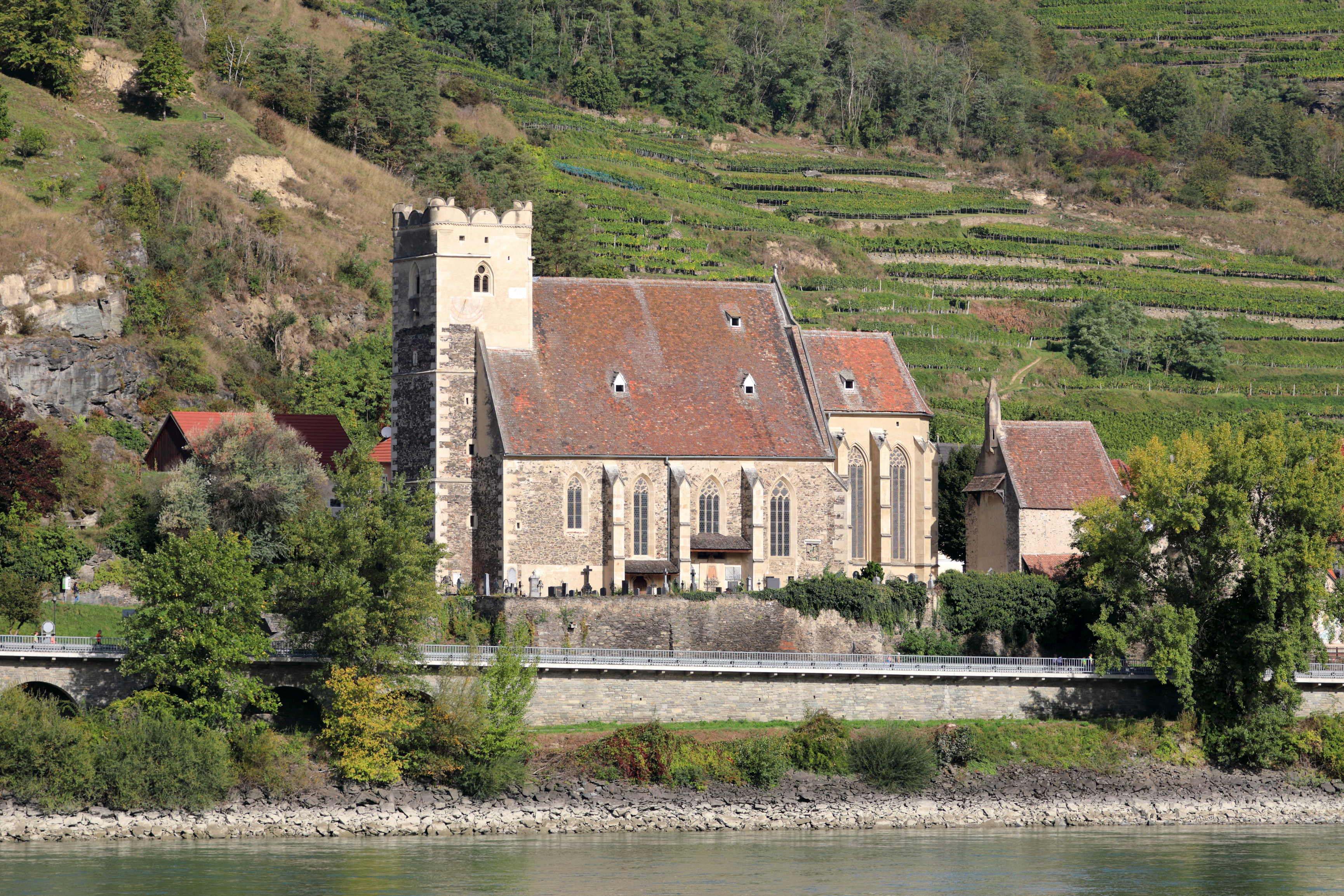 Südansicht (vom rechten Donauufer) der Filialkirche hl. Michael und des Karners (um 1395 erbaute) in St. Michael, ein Ortsteil der niederösterreichischen Marktgemeinde Weißenkirchen in der Wachau.Die ehemalige Wehrkirche wurde leicht erhöht am linken Donauufer errichtet und ist die Mutterpfarre der Wachau. Sie wurde an der Stelle einer kleinen keltischen Opferstätte errichtet und im Jahre 987 erstmals urkundlich erwähnt. Die Kirche in ihrer heutigen Gestalt ist ein spätgotischer, innen barockisierter Staffelhallenbau mit Chor und einem markanten Wehrturm aus dem ersten Viertel des 16. Jahrhunderts. Um 1500 bis 1530 wurde sie durch eine Wehranlage ergänzt bzw. diese verstärkt. Seit der Josephinischen Kirchenreform ist die Kirche eine Filiale von Wösendorf (1784).